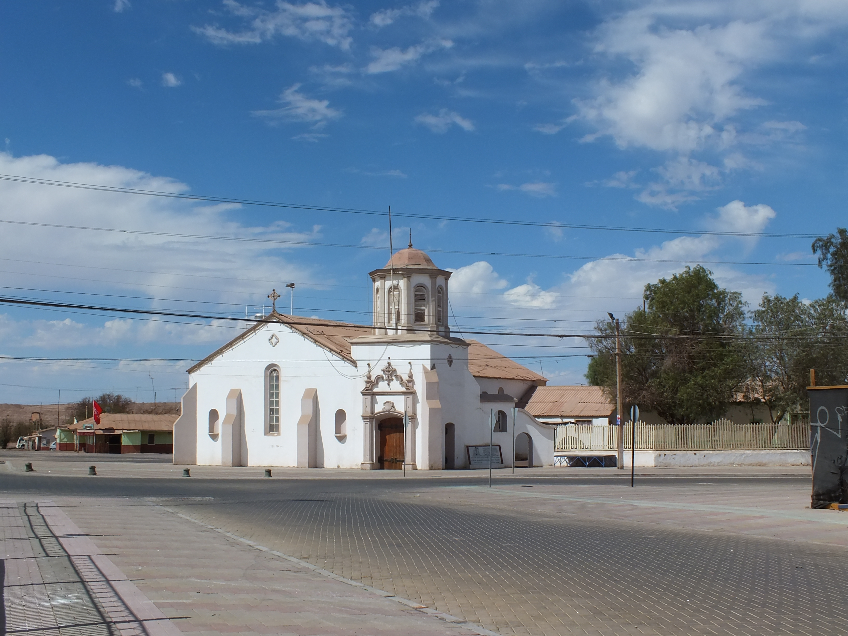 Oficina Salitrera María Elena: Hermoso lugar que se quedó pegado en el tiempo, pero con los modernismos propios de esta época This is a photo of a national monument in Chile: 2025